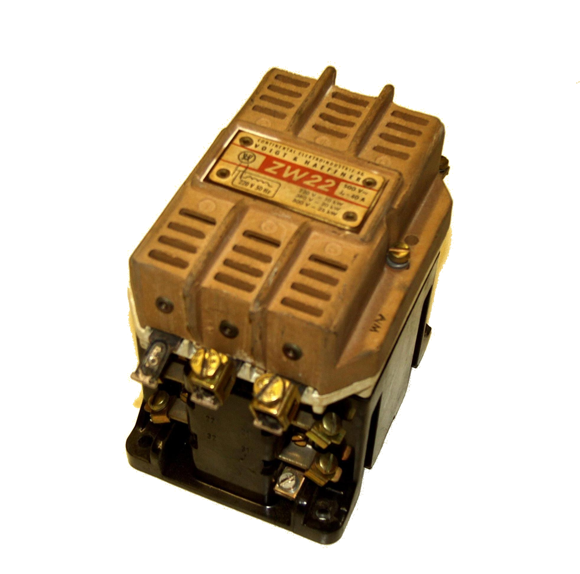 Schaltschütz der Fa.Voigt & Haeffner